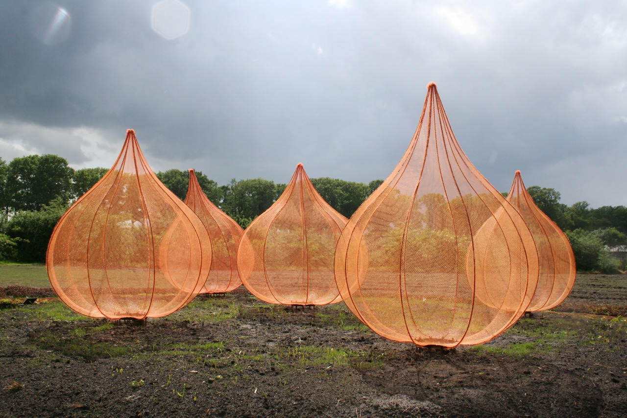 Knollen en Bollen 2014. Hierro y rafia. Cinco piezas de unos 2'2 x 1'7 m.